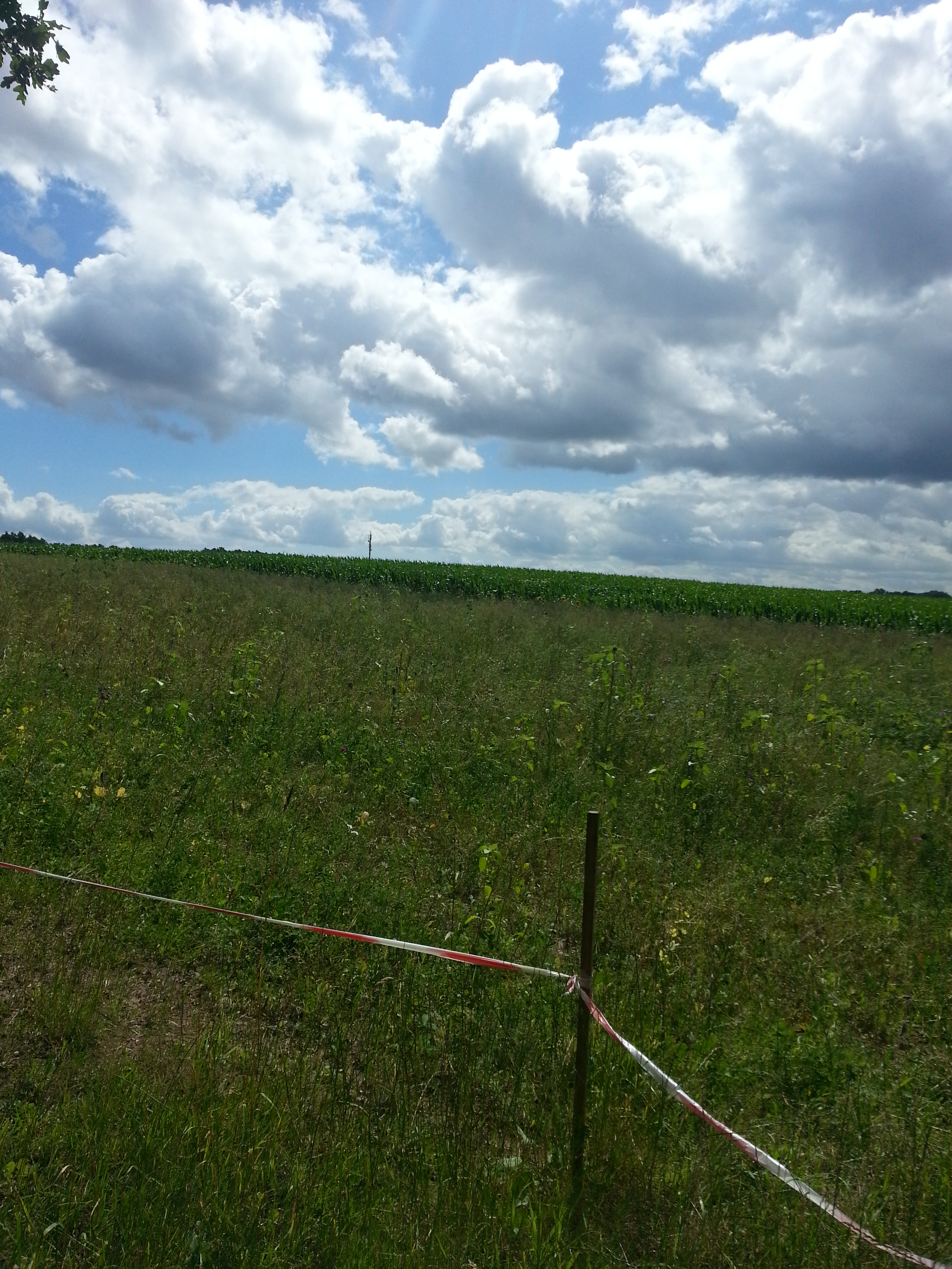 Landschaft in Primank